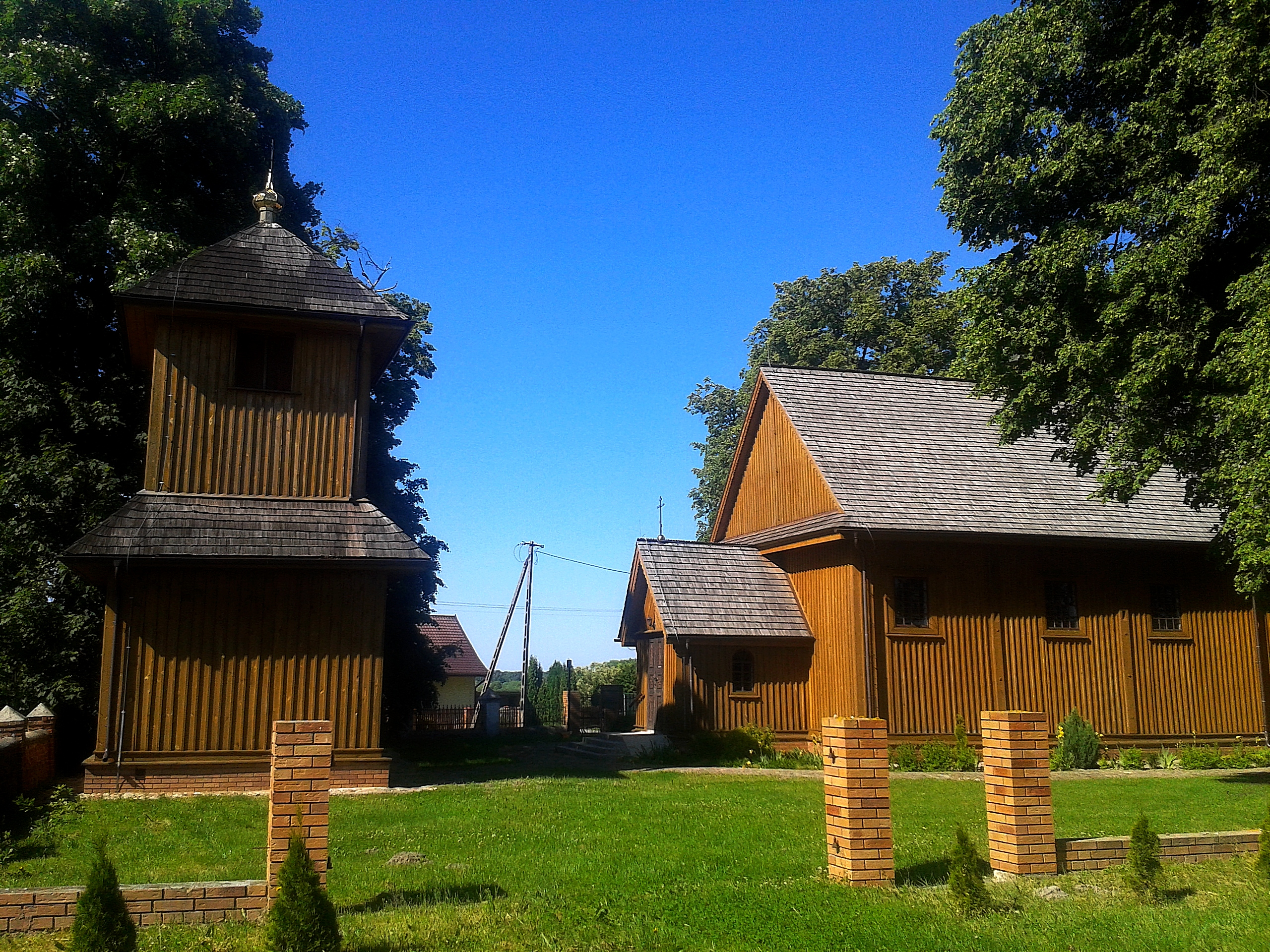 Cerkiew w Horostycie oraz dzwonnica